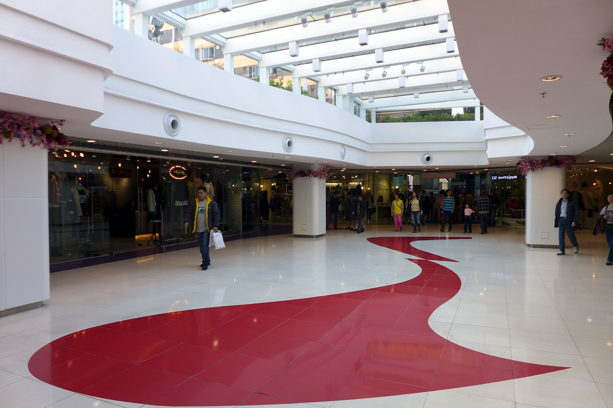 HANDS Zone H Atrium